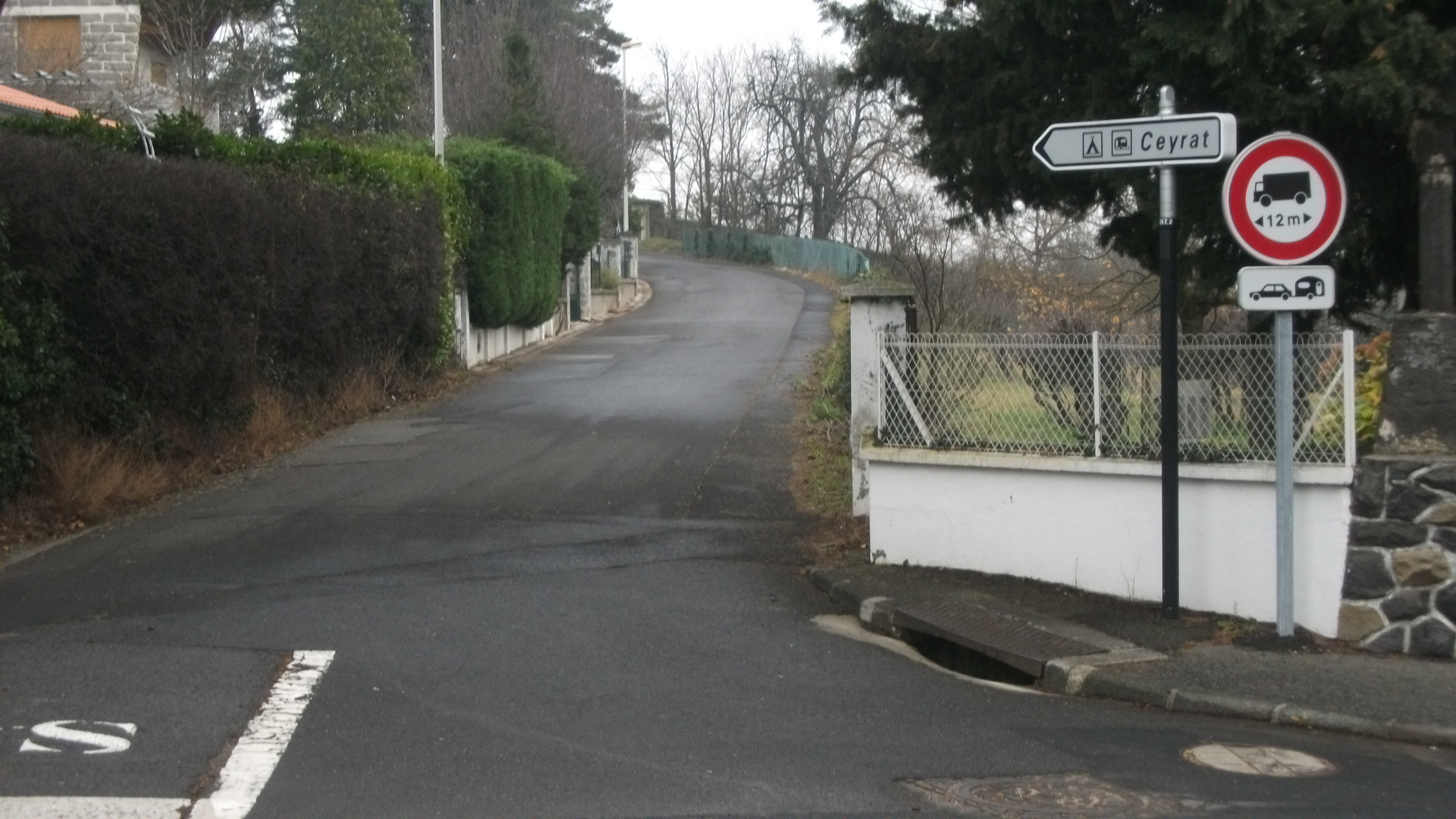 La voie d'accès au camping municipal de Ceyrat. La longueur est limitée à 12 mètres Panneau de limitation de longueur et panonceau associé, SES, 1998